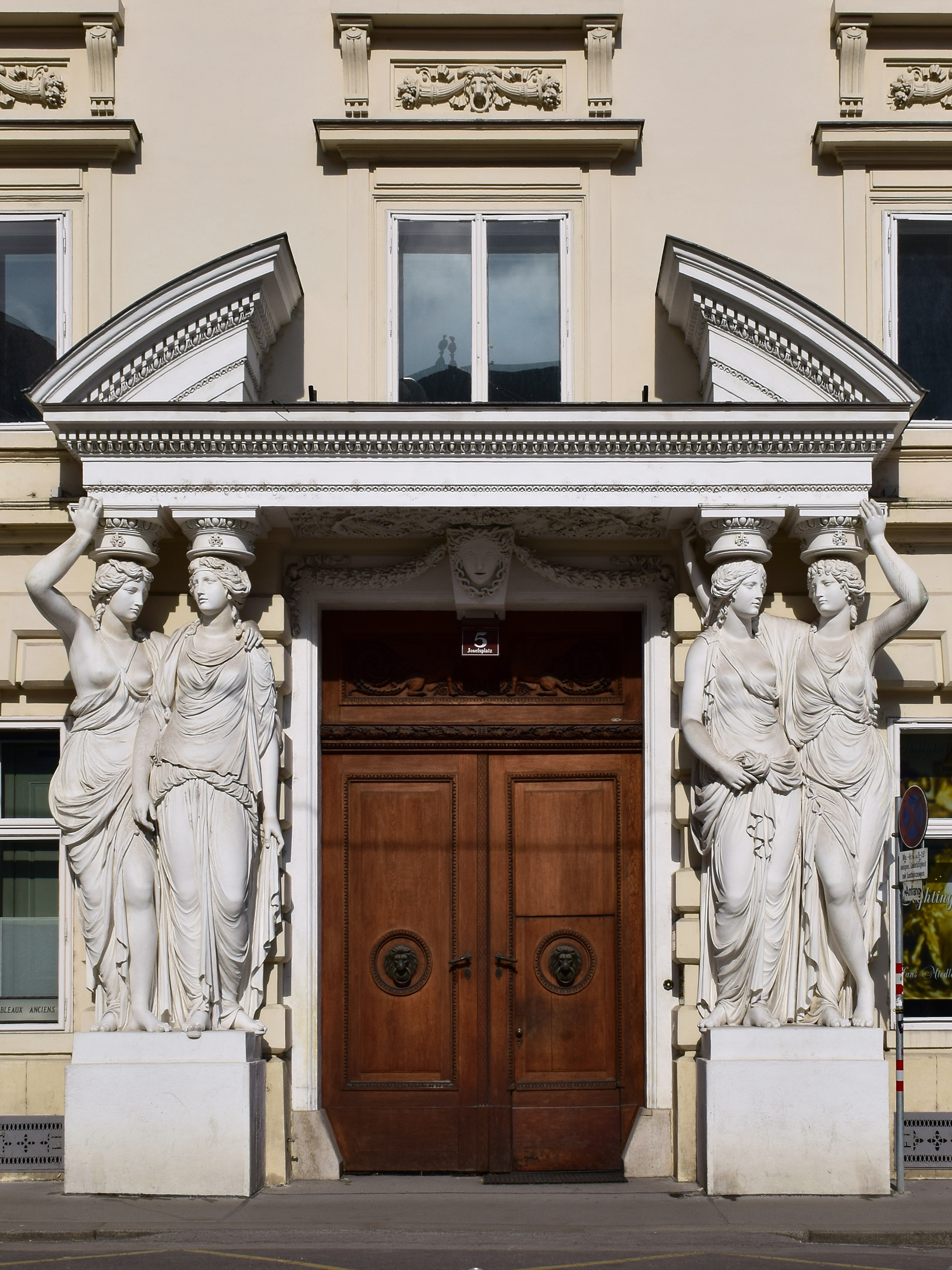 Palais Fries-Pallavicini